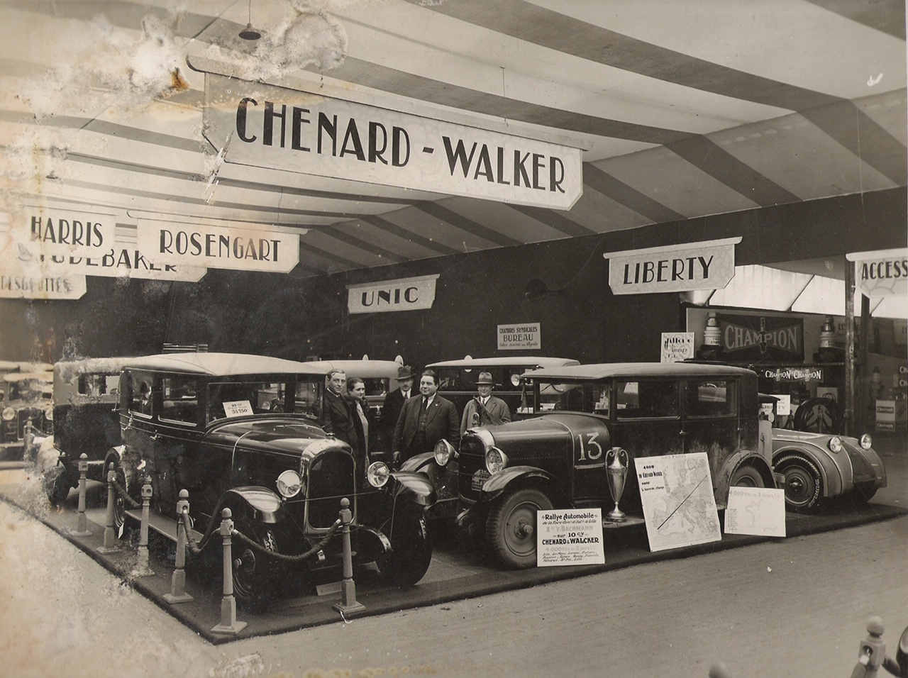 Exposition Fernand Bachmann Chenard & Walcker